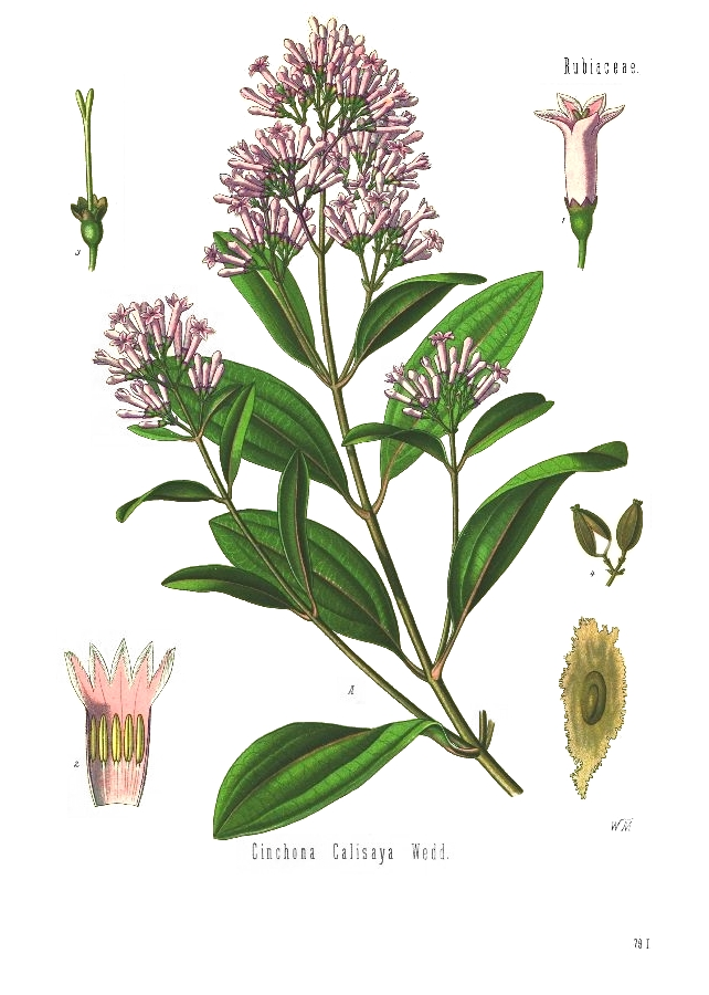 Fieberrindenbaum. A blühender Zweig, natürl. Grösse; 1 Blüthe, vergrössert; 2 dieselbe im Längsschnitt, desgl.; 3 Kelch mit hervorragendem Griffel und Narbe, vergrössert; 4 Theil der Fruchtrispe, natürl. Grösse; 5 Same, vergrössert.